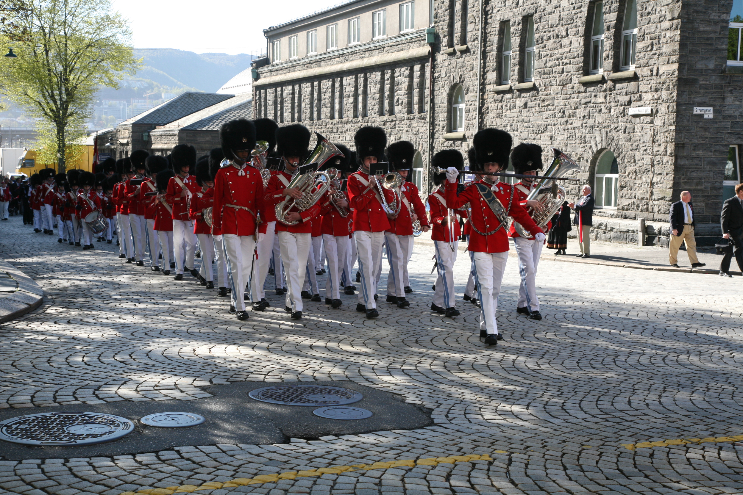 Tivoligarden i Bergen